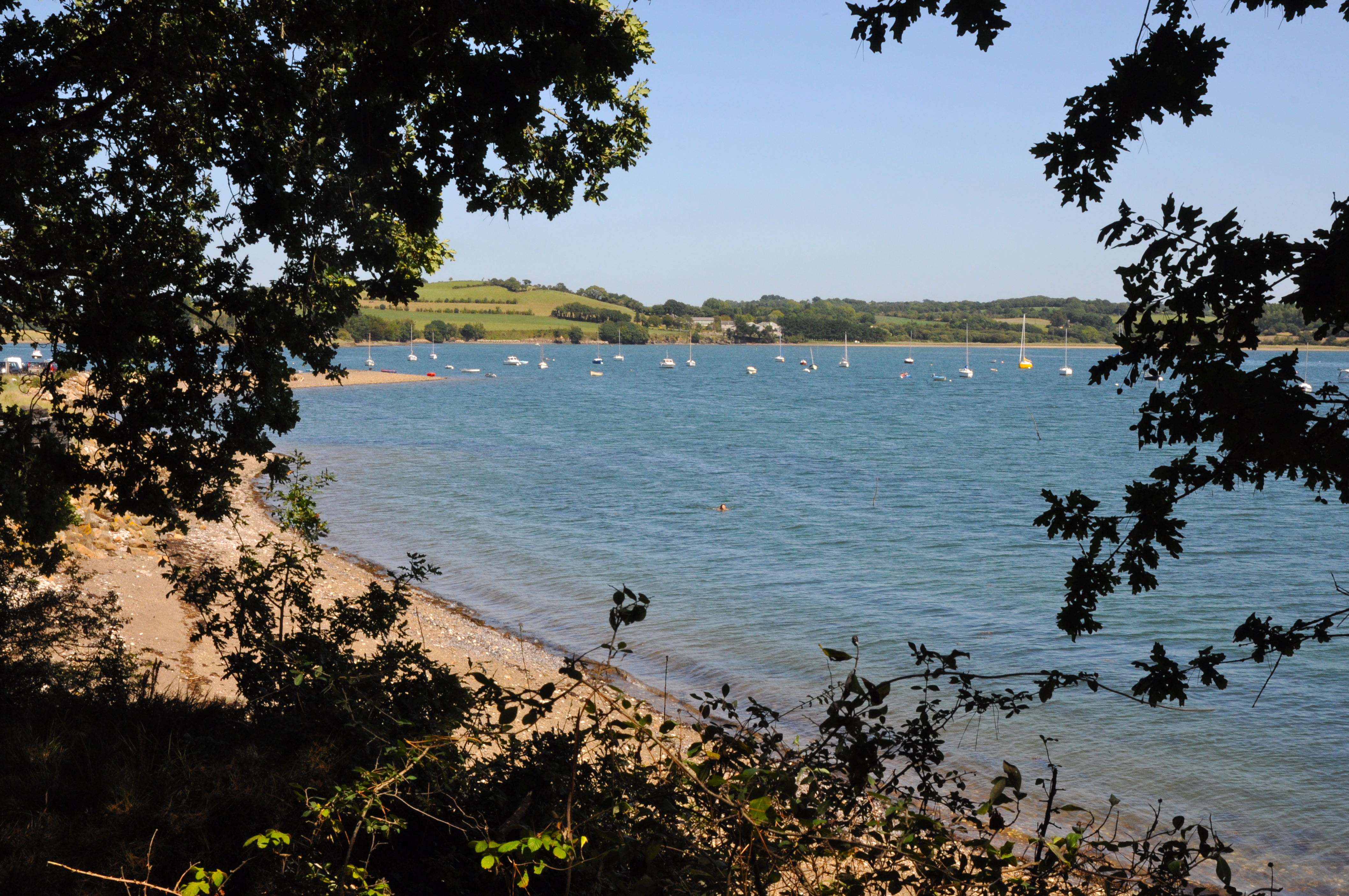 La rivière de Daoulas au niveau de Kersanton en LOPERHET, sur l'autre rive, Logonna-Daoulas